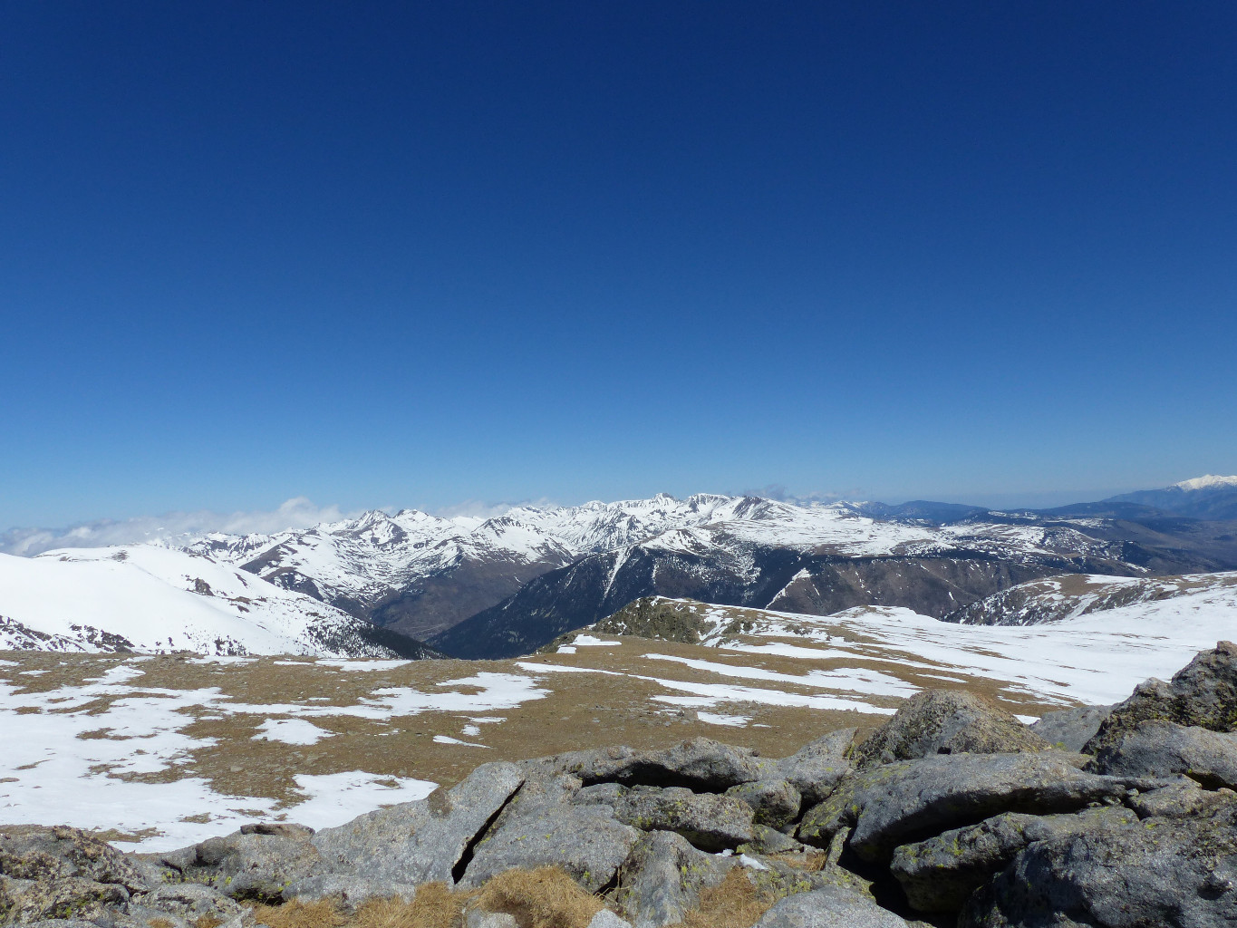 Vue du sommet du Campcardós, vers l'Est